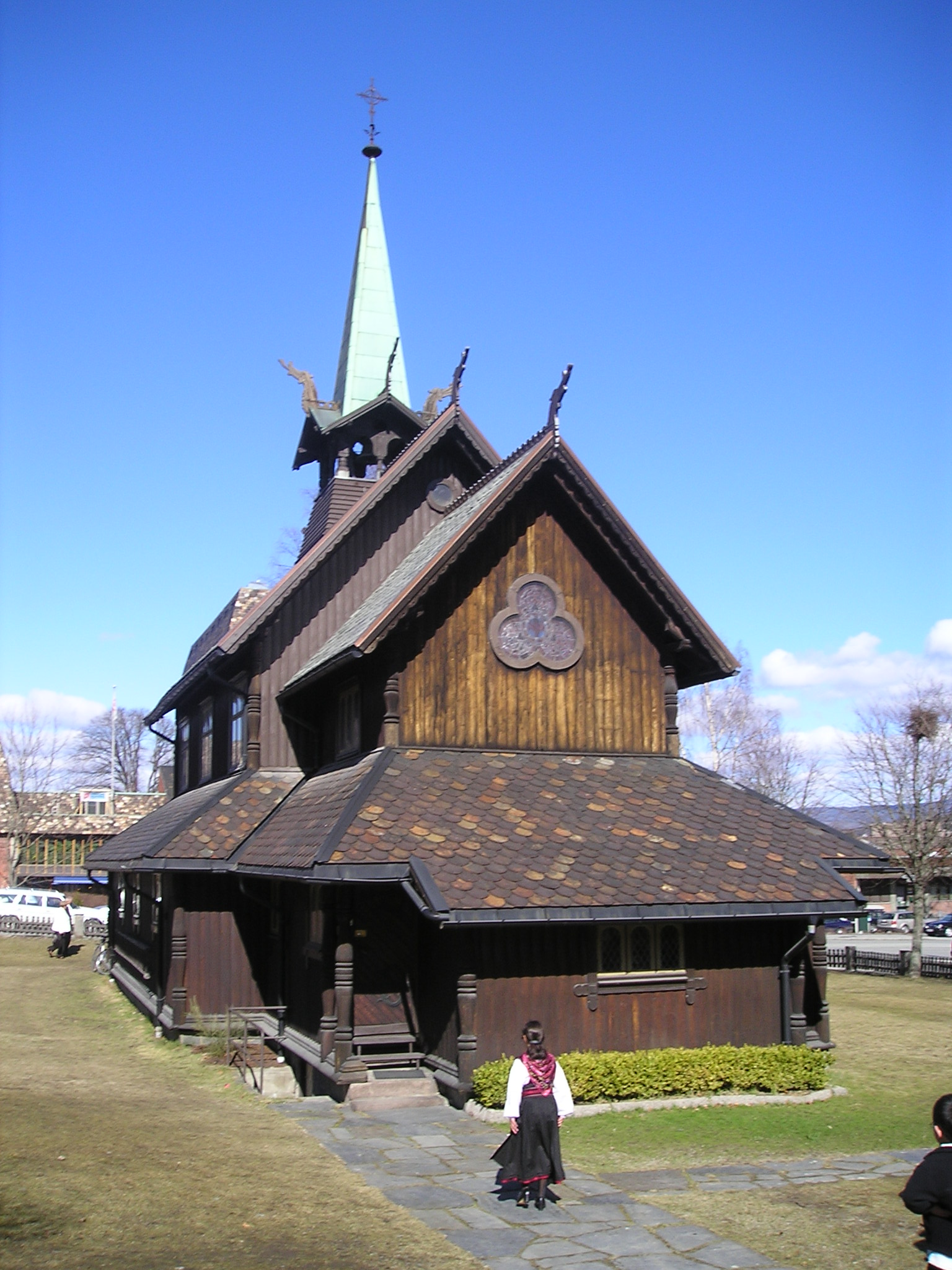 Vår Frue Kirke, Porsgrunn, Telemark.